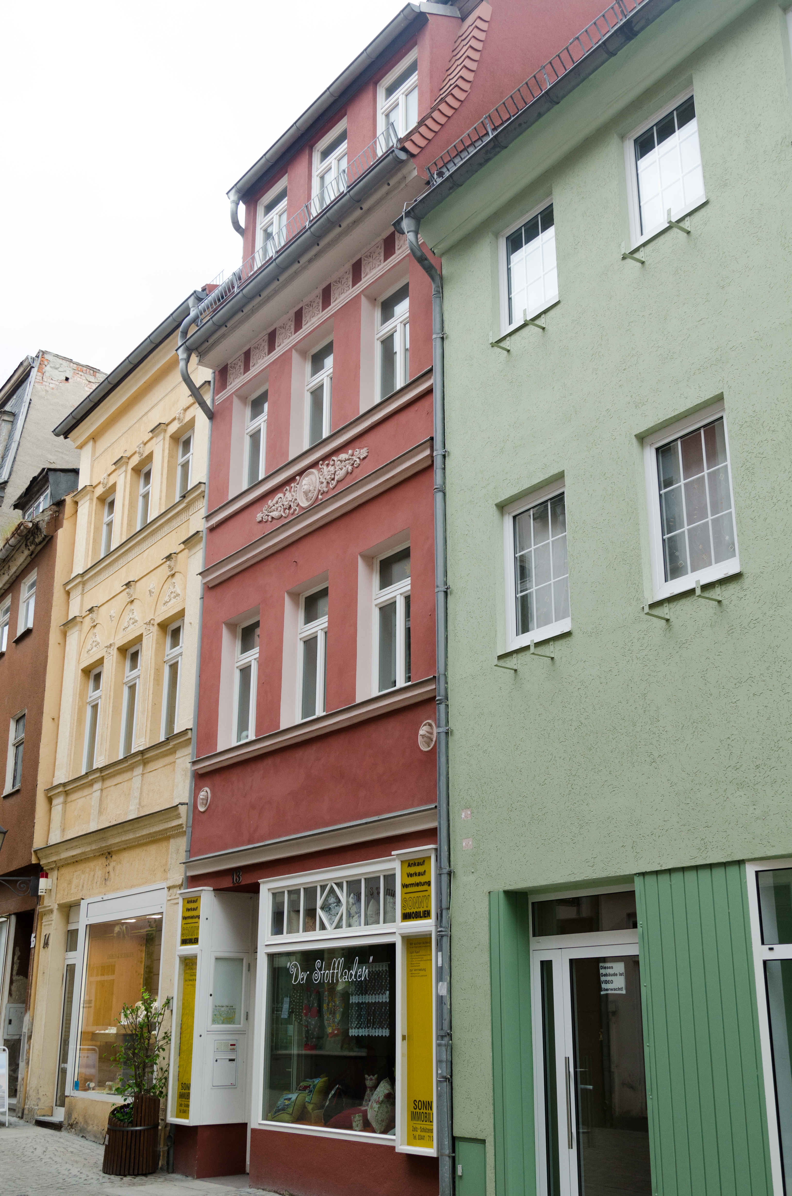 Zeitz, Kramerstraße 13